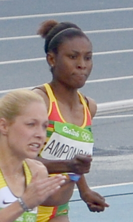 4ème Série du 200m féminin de Rio 2016